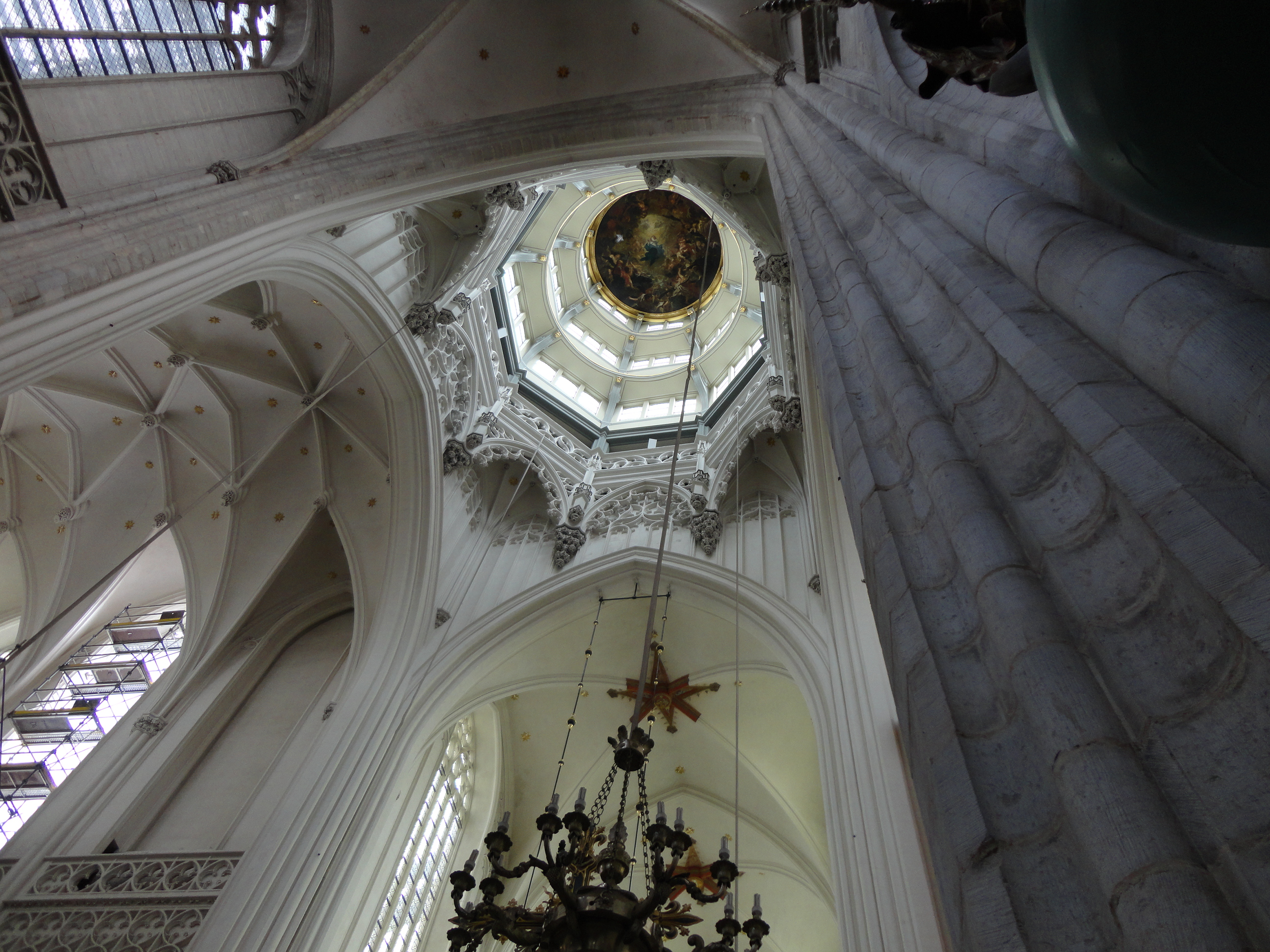 Coupole de la croisée (vue intérieure) de la cathédrale d'Anvers